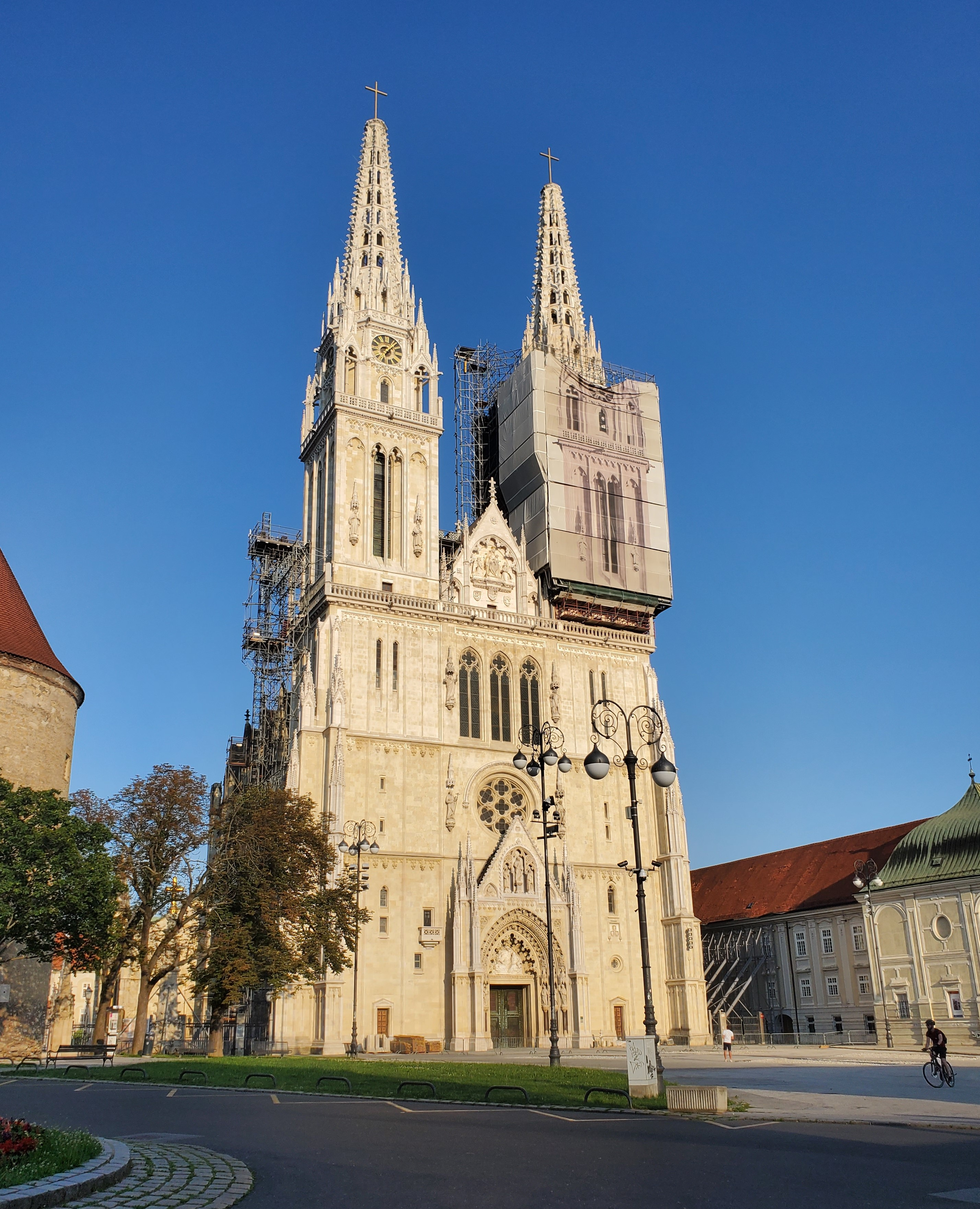 Zagrebačka katedrala nakon potresa sa postavljenim metalnim križevima na vrhu